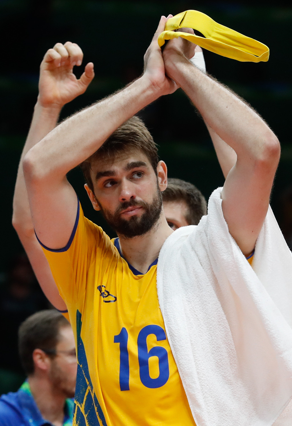 Rio de Janeiro - Seleção brasileira masculina de vôlei vence a da França por 3 sets a 1 no Maracanãzinho e vai às quartas-de-final (Fernando Frazão/Agência Brasil)